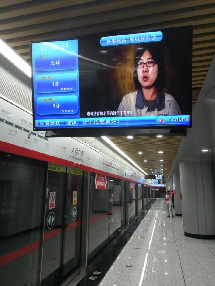 长春人民广场站显示屏